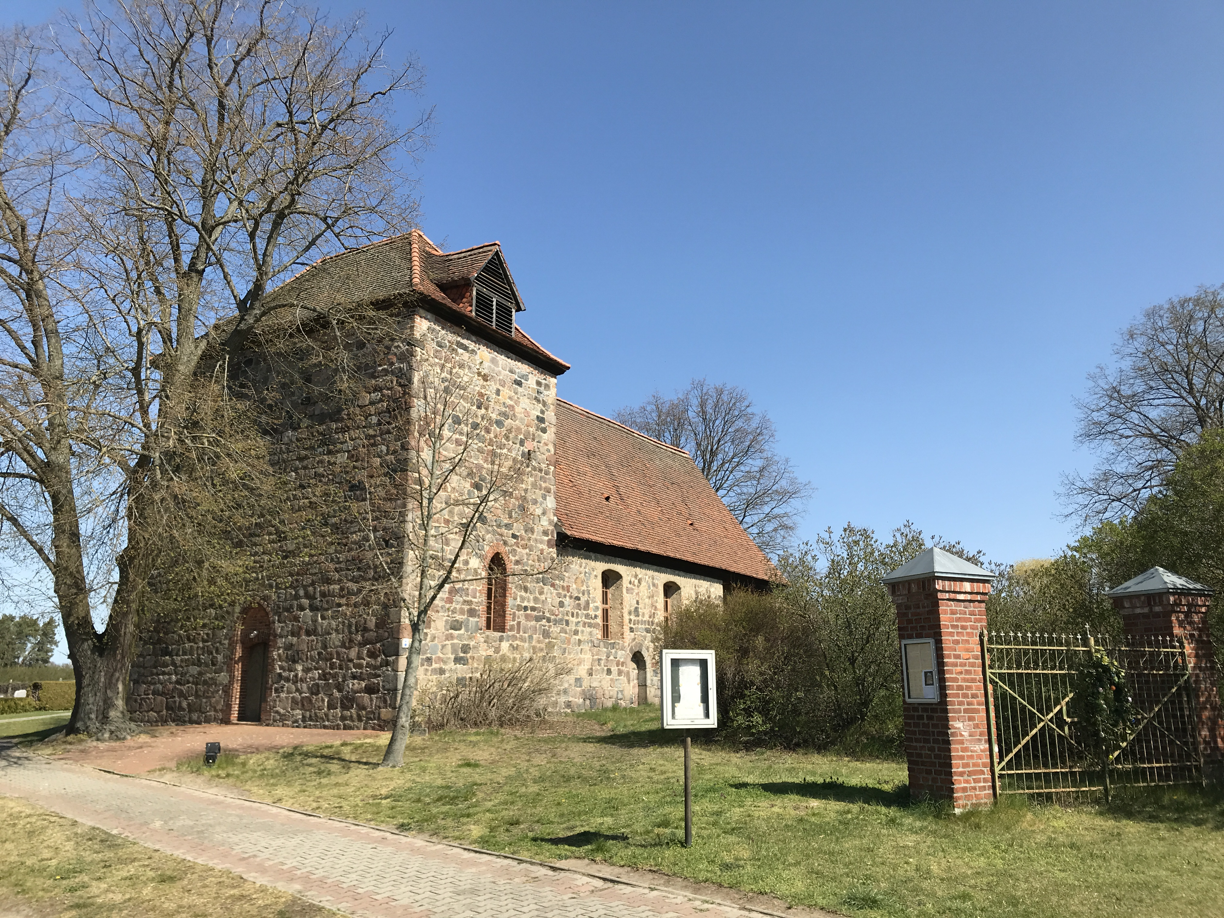 Die Dorfkirche Michelsdorf ist eine Feldsteinkirche in Michelsdorf, einem Ortsteil der Gemeinde Kloster Lehnin im Landkreis Potsdam-Mittelmark in Brandenburg. Im Innern befinden sich unter anderem die Reste einer Ausmalung aus dem Jahr 1946.